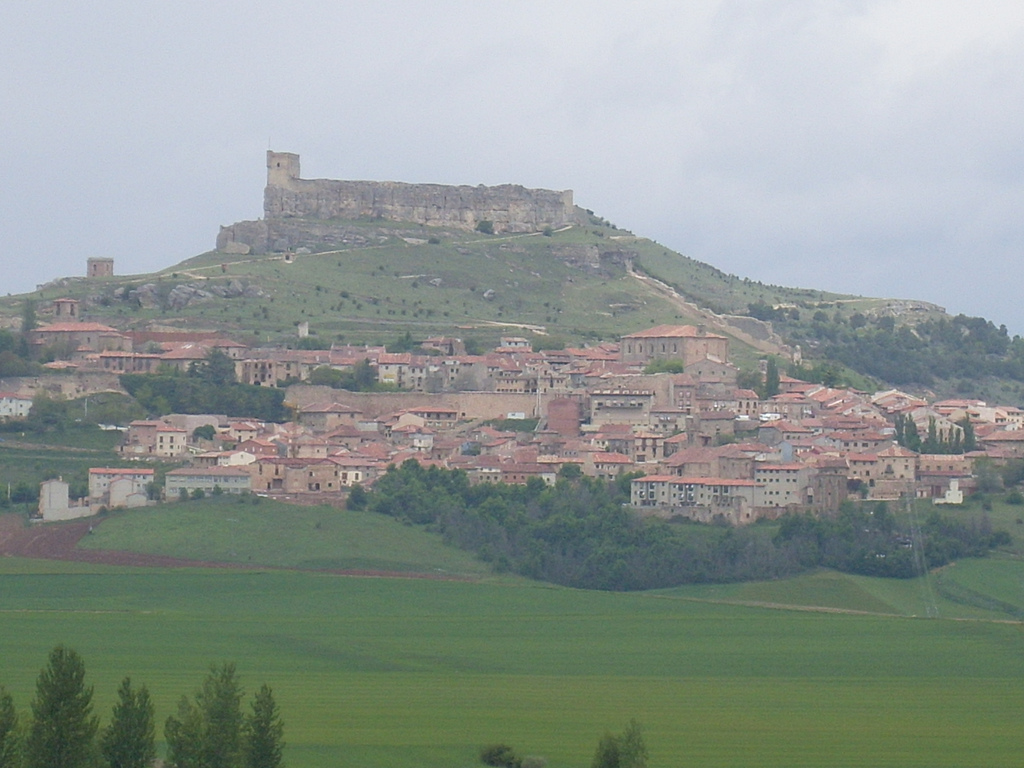 Panorámica de Atienza, Guadalajara (España)